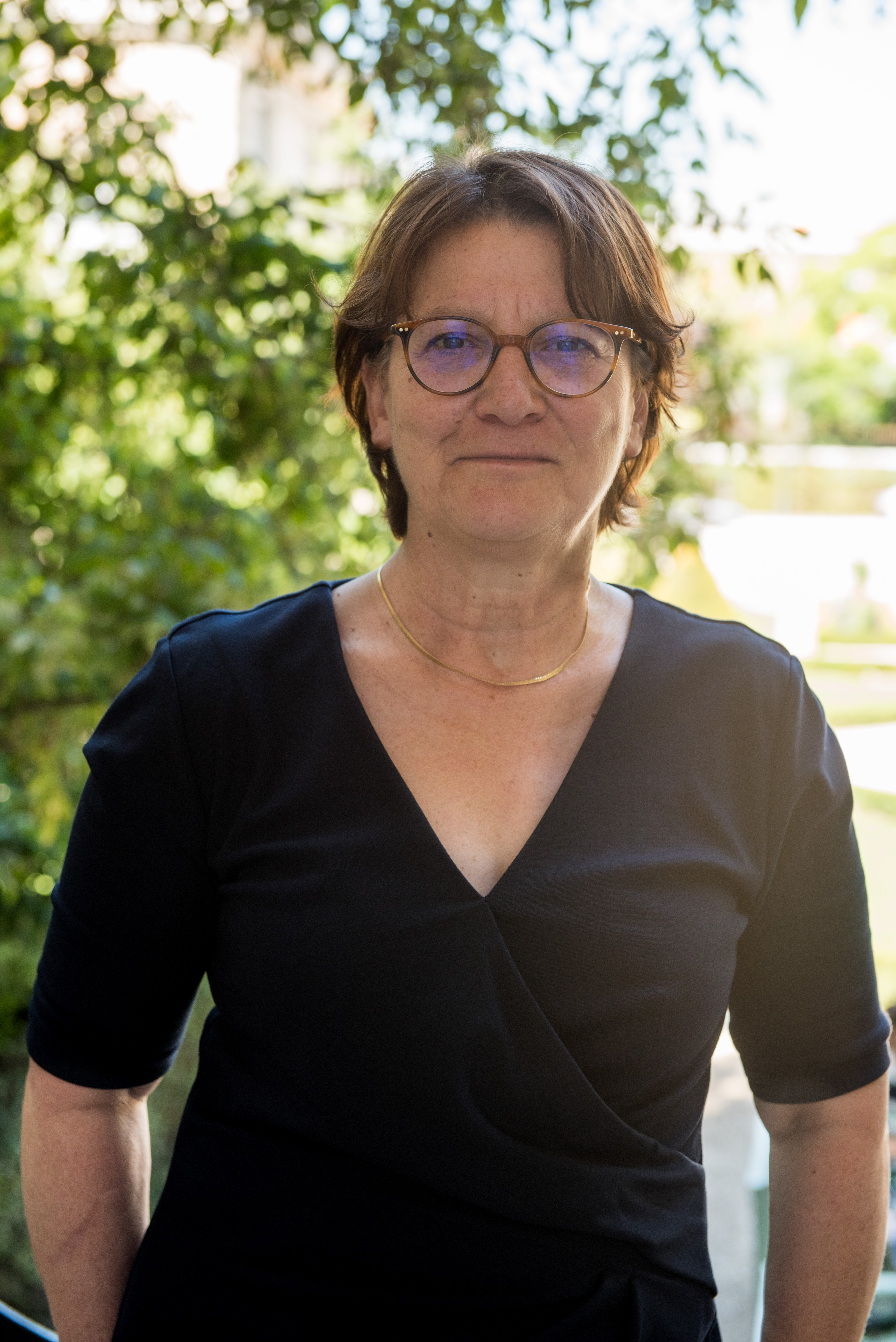 Nadia ESSAYAN dans le jardin des Quatre colonnes du palais Bourbon en 2017.